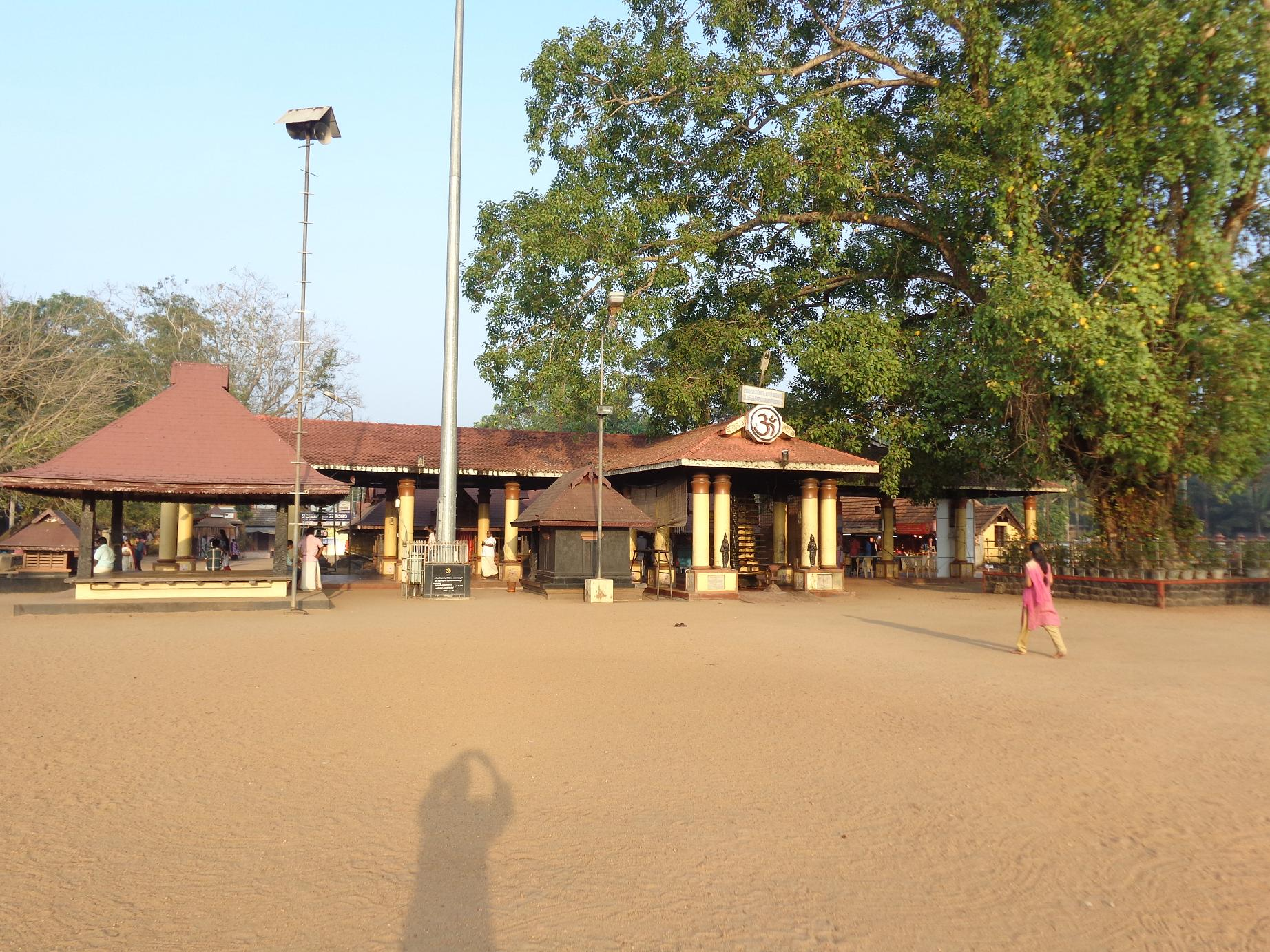 cherttikulangara devi temple a view